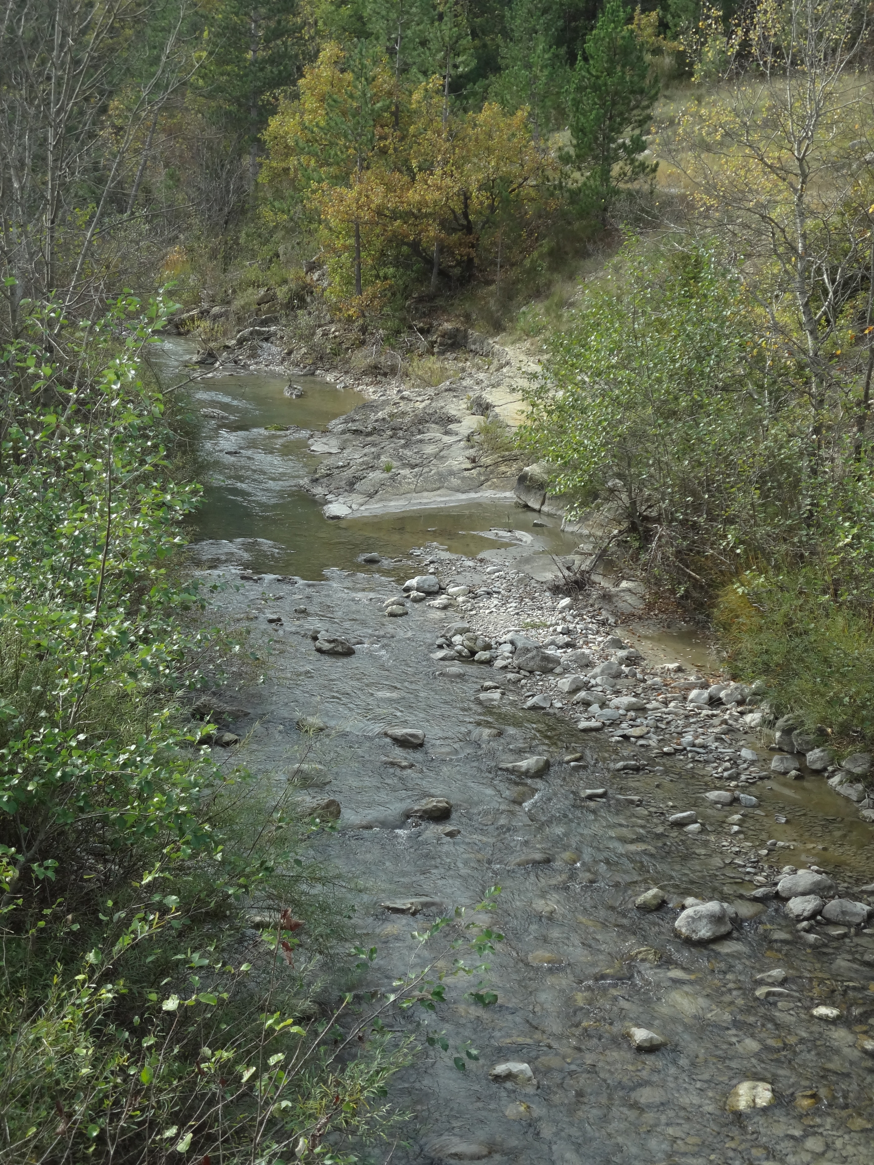 rivière la Biaisse à Valbelle